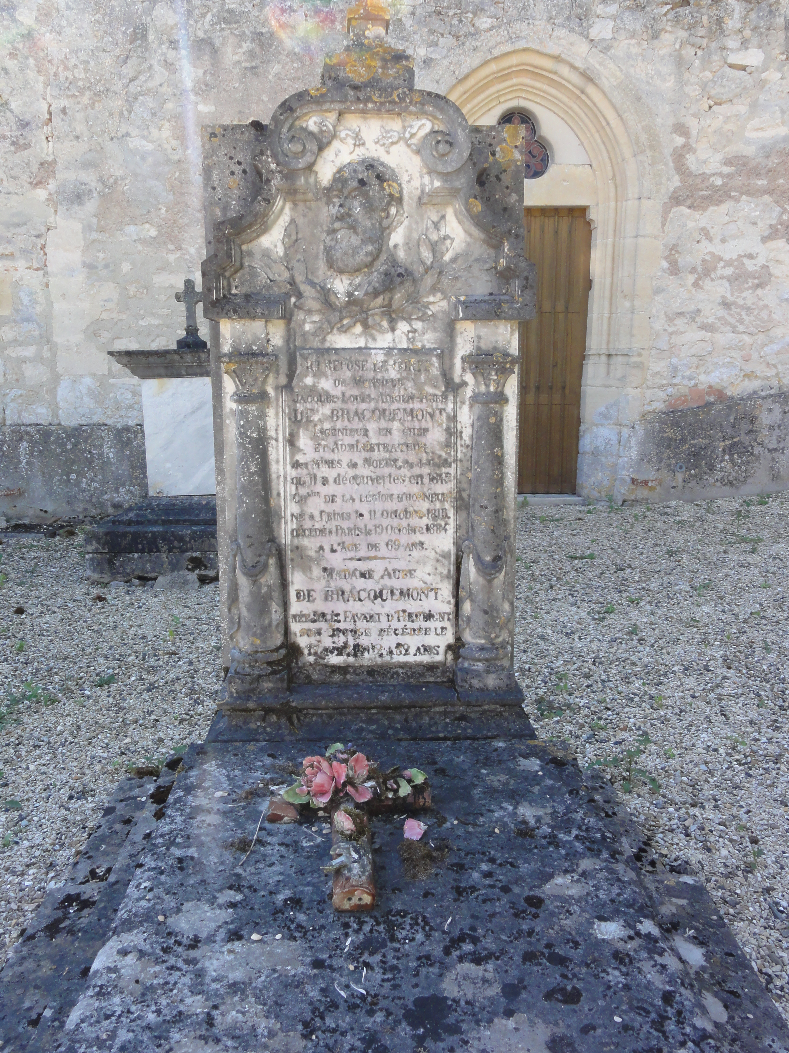 Meurival (Aisne) tombe Braquemont, ingénieur aux mines de Nœux